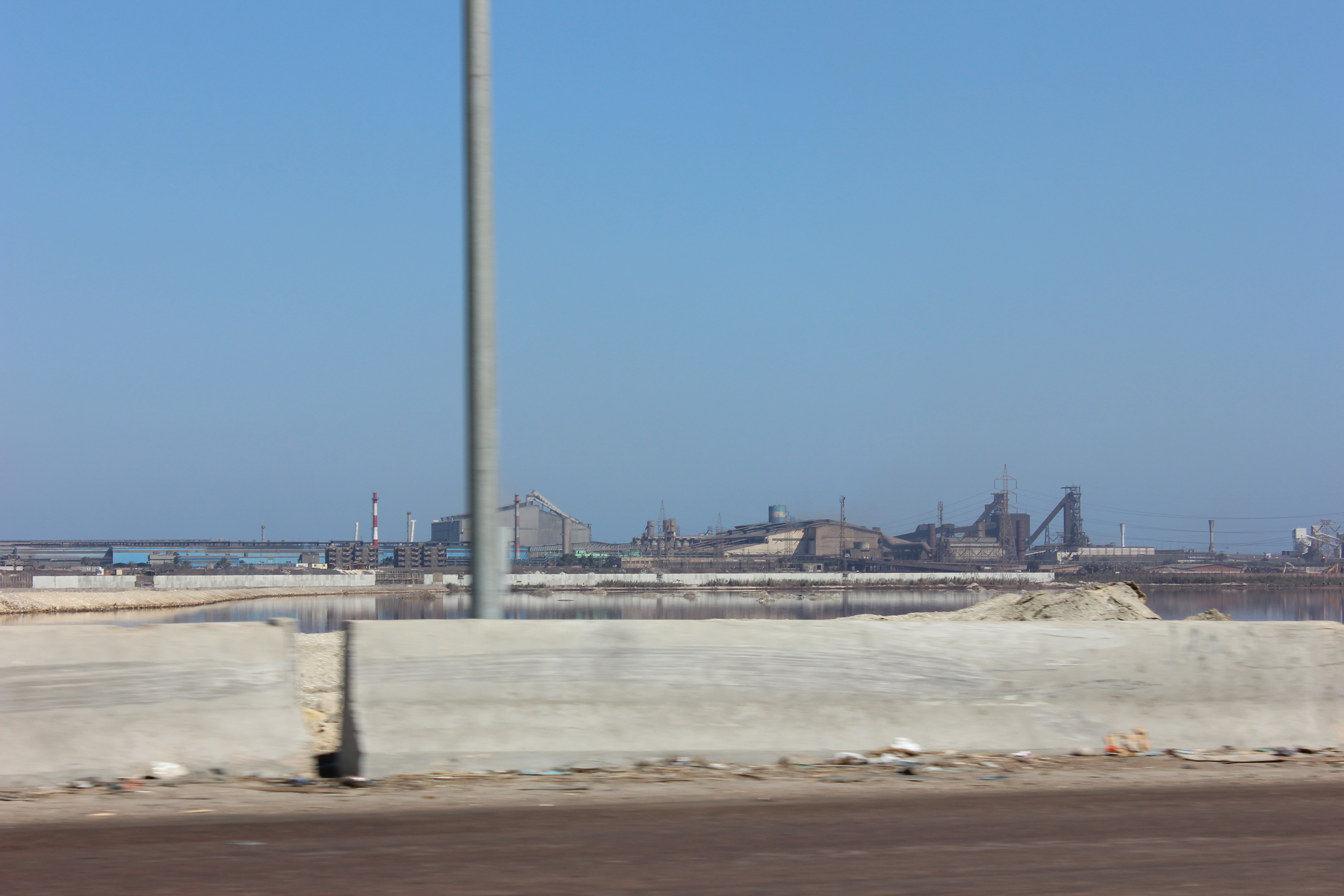 الطريق الدولي الساحلي بالإسكندرية.